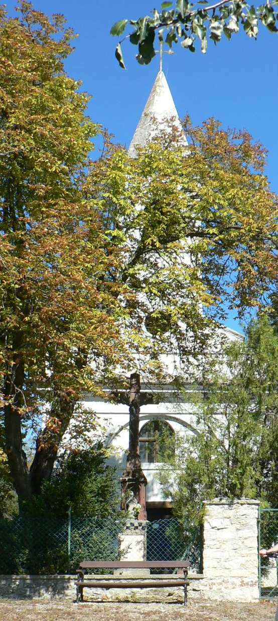 Balatonudvari Tours-i Szent Márton püspök nevére szentelt római katolikus temploma. ID 9773. R.k. templom, román stílusú, 13. sz. Újjáépítve klasszicista stílusban 1840 körül.